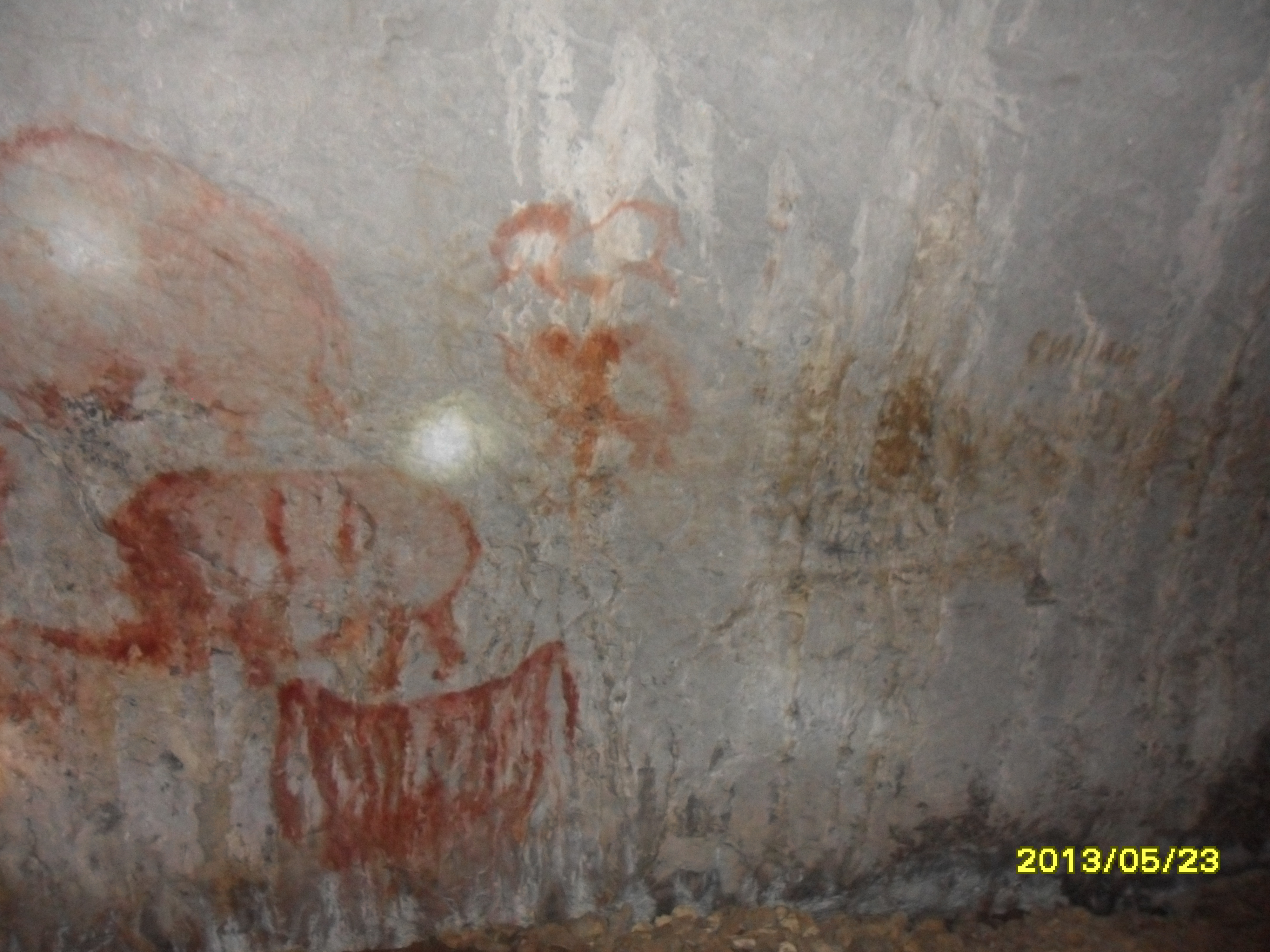 Капова пещера (Шульган-Таш), Бурзянский район This image is related to the protected area of Russia number 0220101